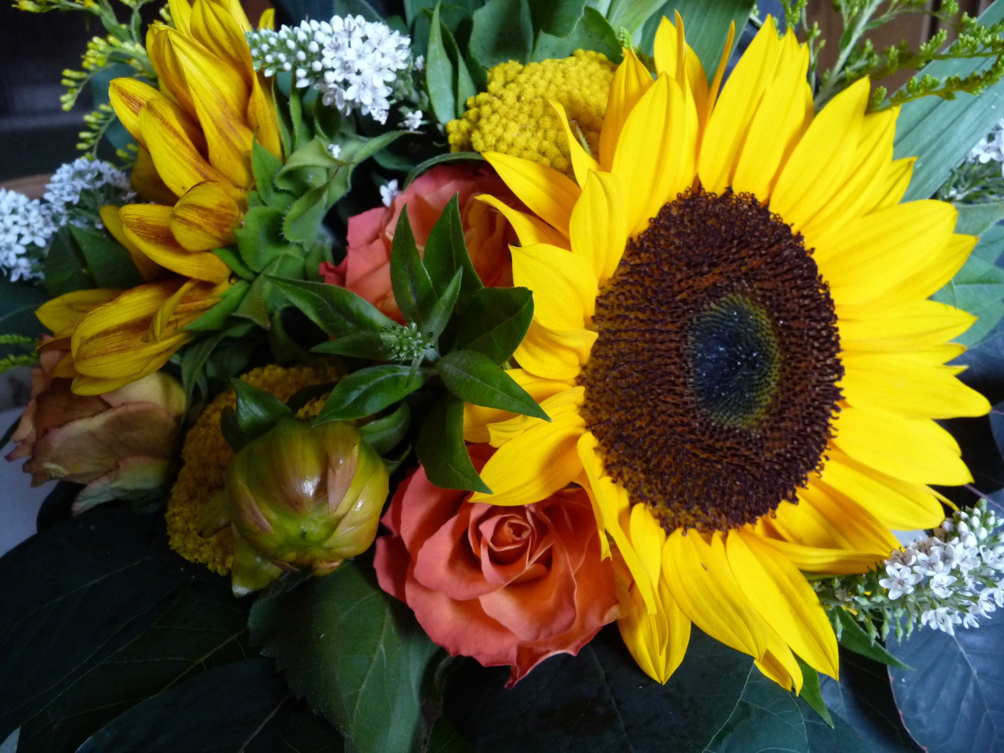 Strauß mit Sommerblumen (unter anderem Sonnenblumen und Rosen)